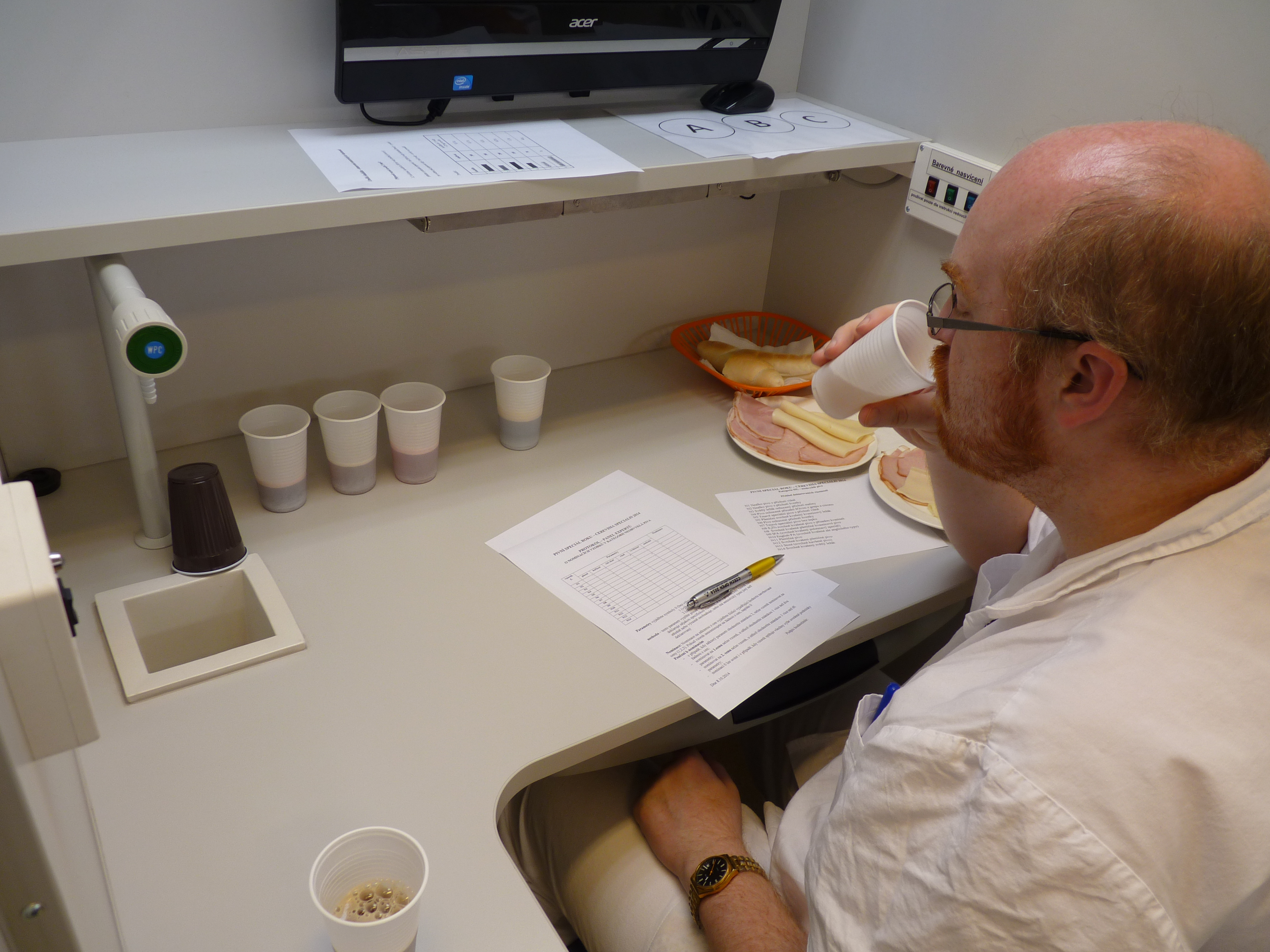 Degustace piva v senzorickém centru